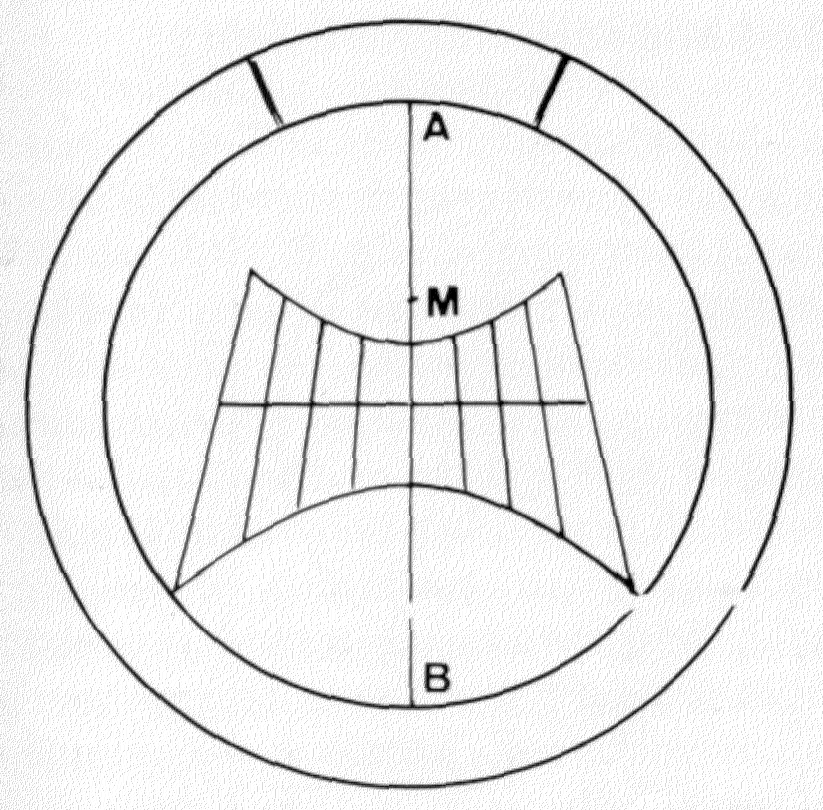 antike Sonnenuhr discus in plano nach Vitruv